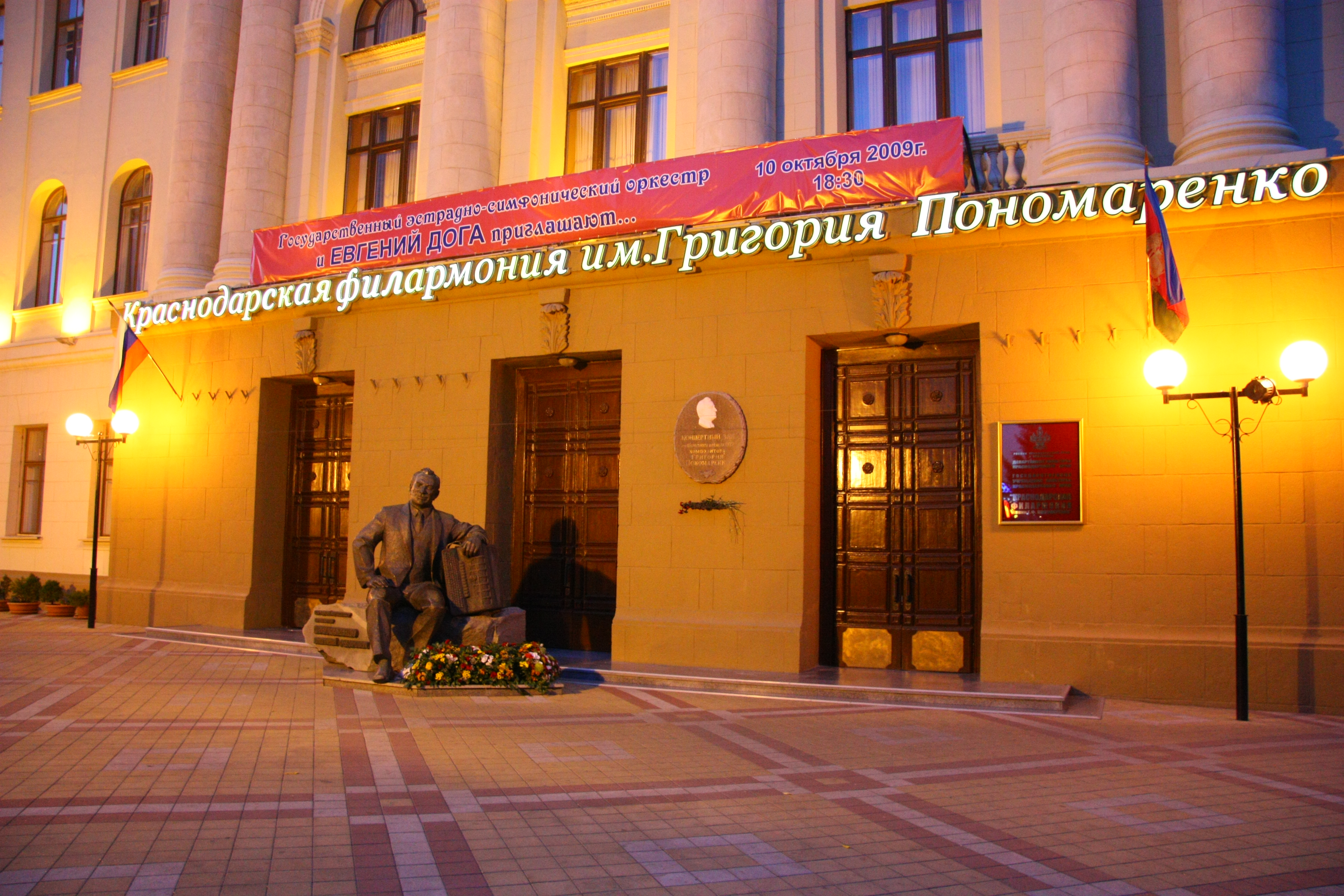 Edificio de la Filarmónica de Krasnodar Grigori Ponomarenko, Krasnodar, Rusia.